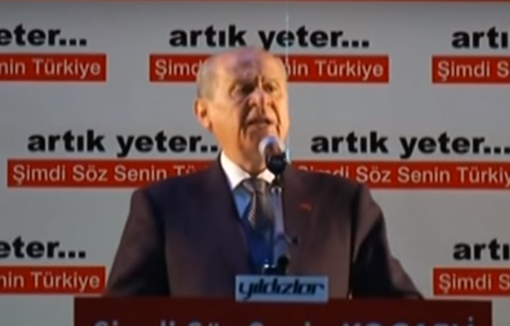 Devlet Bahçeli Kocaeli'de halka sesleniyor.